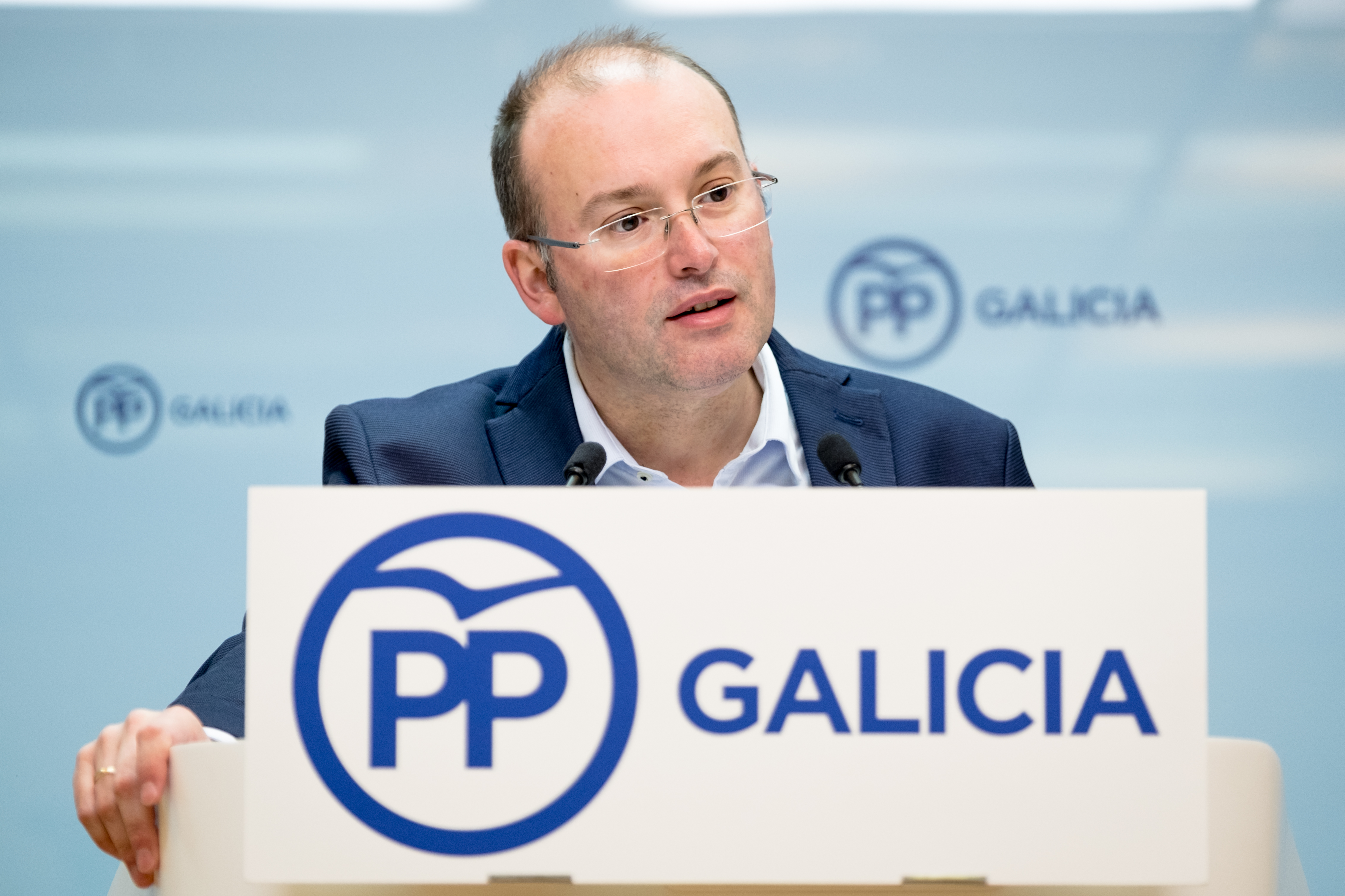 Miguel Tellado